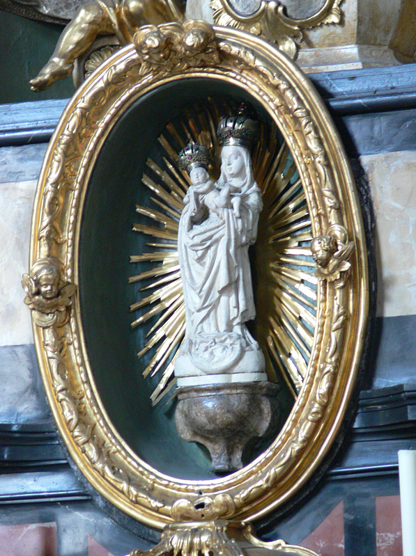 Pfarrkirche St. Martin, Bamberg Marienaltar, Gnadenbild "Maria Trost", Alabaster, Mitte 15. Jh. (seit 1617 in Bamberg, aus Widdern an der Jagst)